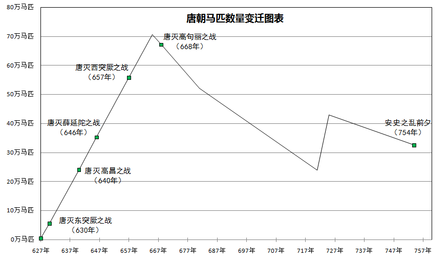 据《新唐书·卷五十·兵志》。